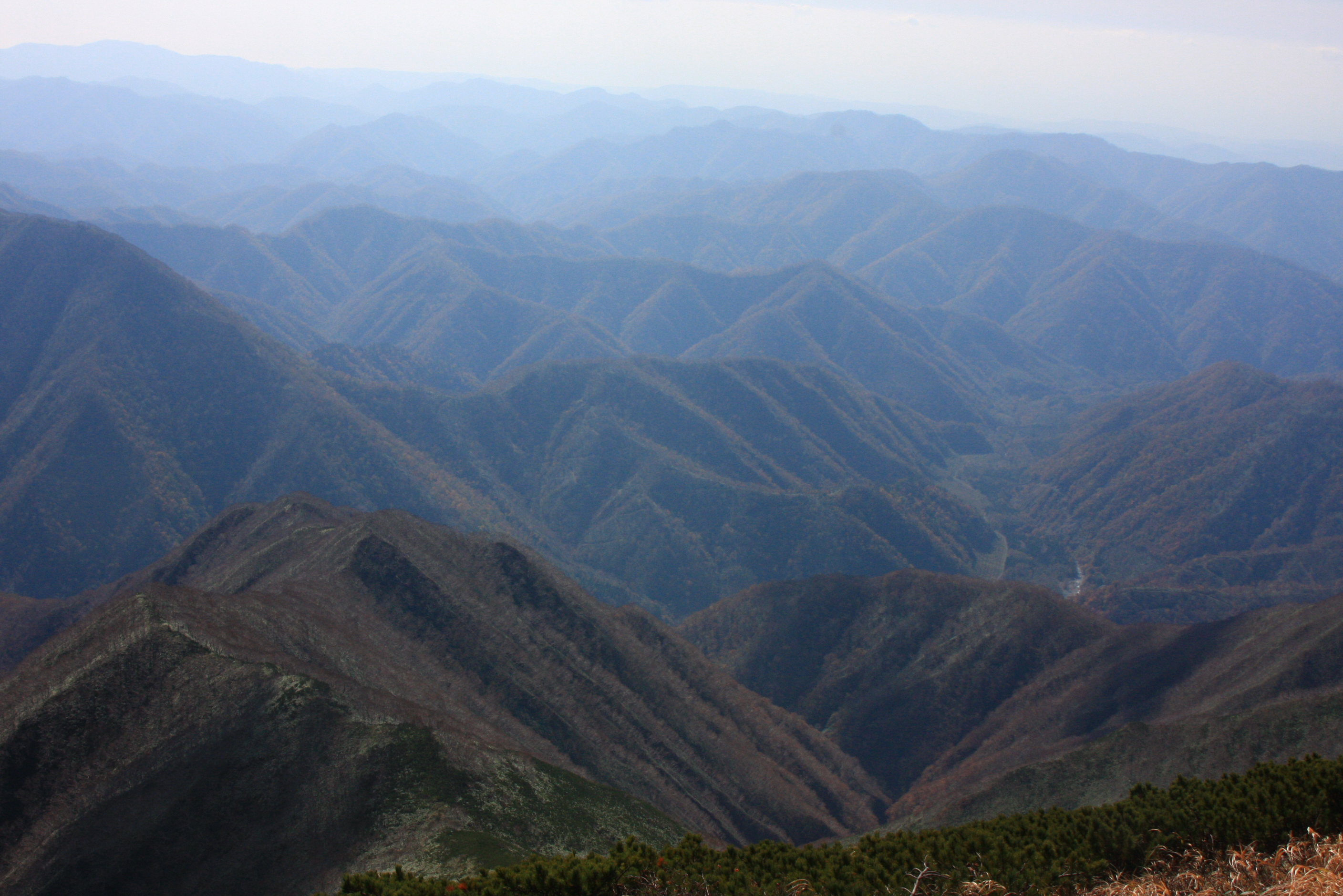 神威岳より南を望む。シュオマナイ川のＶ字谷。